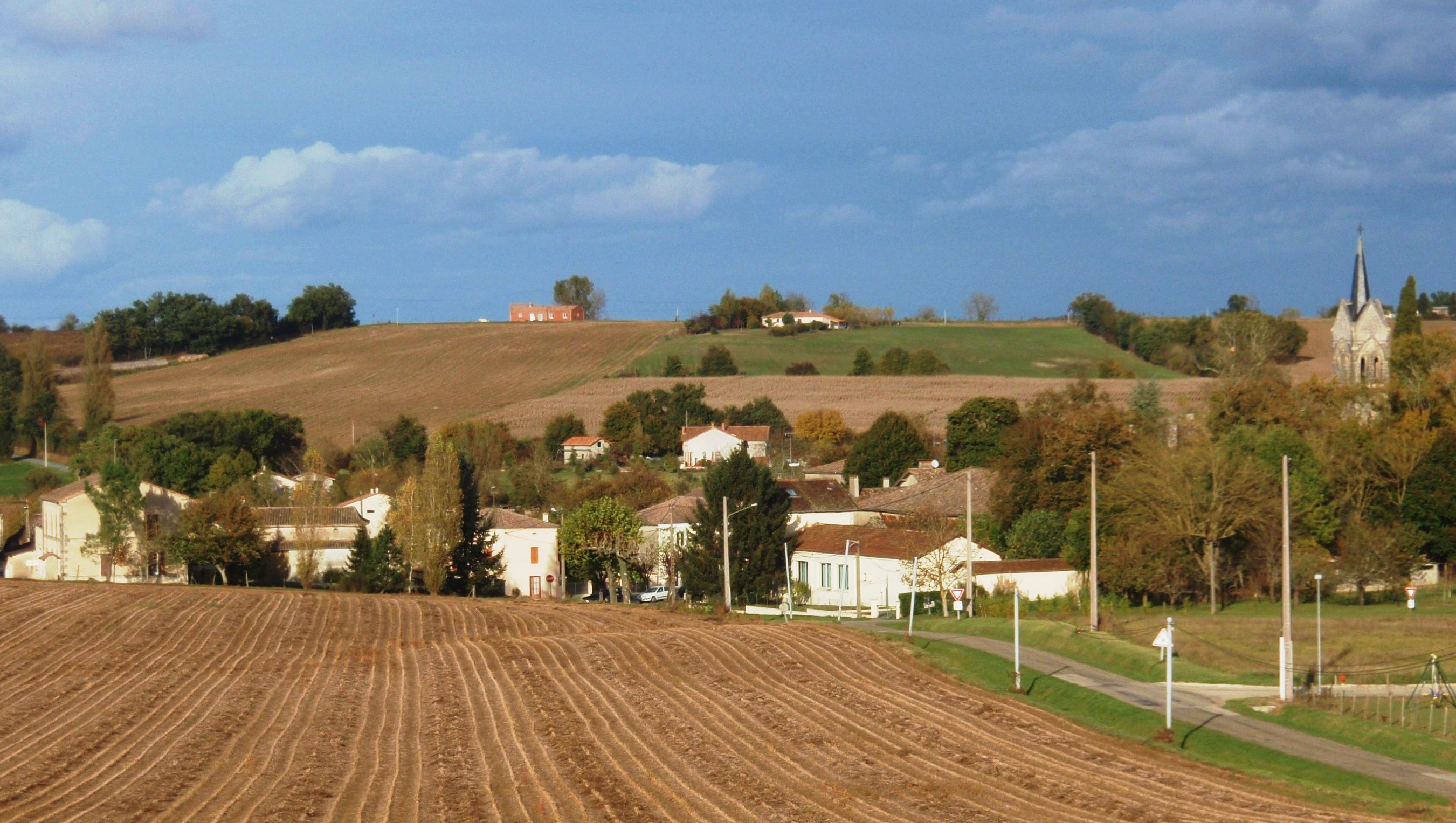 Montignac-de-Lauzun vu du moulin